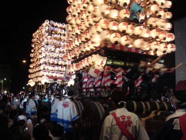 富山県高岡市伏木で行われる伏木曳山祭の喧嘩「かっちゃ」です。